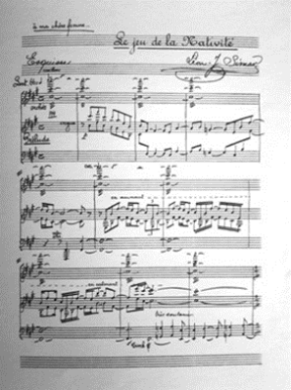 Composicion 3